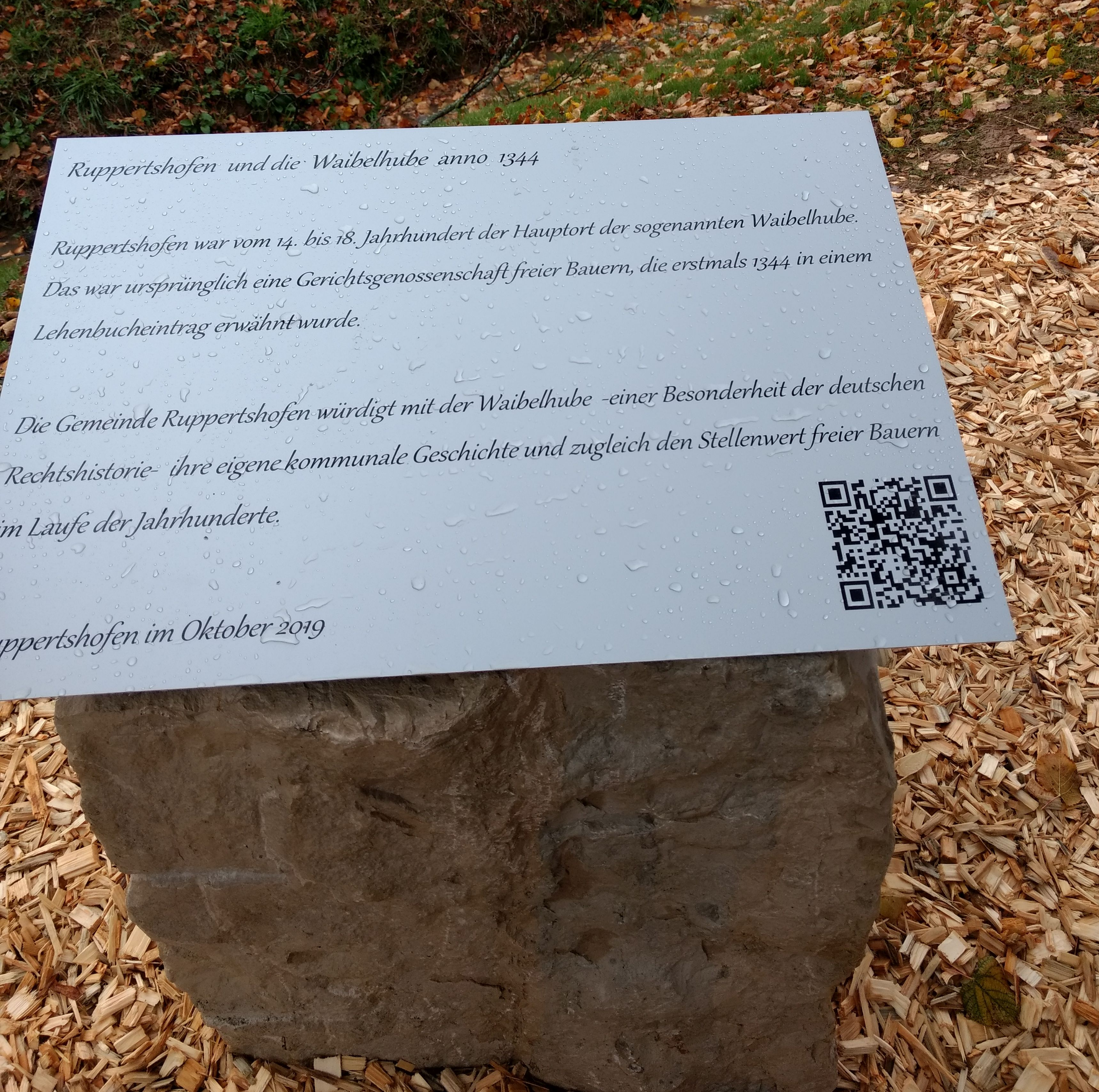 Gedenkstein an die Waibelhube bei Ruppertshofen. INSCHRIFT: Ruppertshofen und die Waibelhube anno 1344 | Ruppertshofen war vom 14. bis 18. Jahrhundert der Hauptort der sogenannten Waibelhube. | Das war ursprünglich eine Gerichtsgenossenschaft freier Bauern, die erstmals 1344 in einem | Lehenbucheintrag erwähnt wurde.| Die Gemeinde Ruppertshofen würdigt mit der Waibelhube - einer Besonderheit der deutschen | Rechtshistorie - ihre eigene kommunale Geschichte und zugleich den Stellenwert freier Bauern | im Laufe der Jahrhunderte. | Ruppertshofen im Oktober 2019""